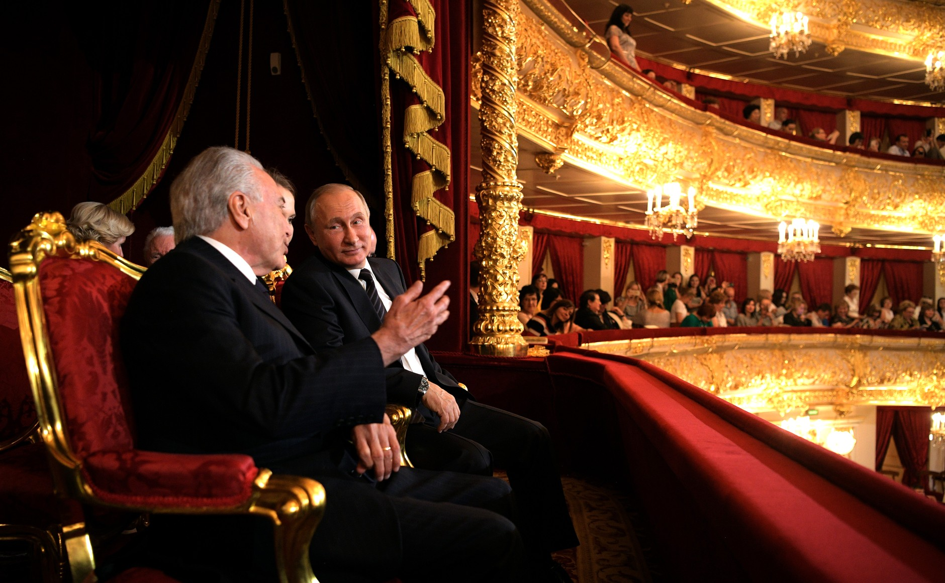 Президент России Владимир Путин и Президент Бразилии Мишел Темер присутствовали в Государственном академическом Большом театре на концерте лауреатов XIII Международного конкурса артистов балета и хореографов